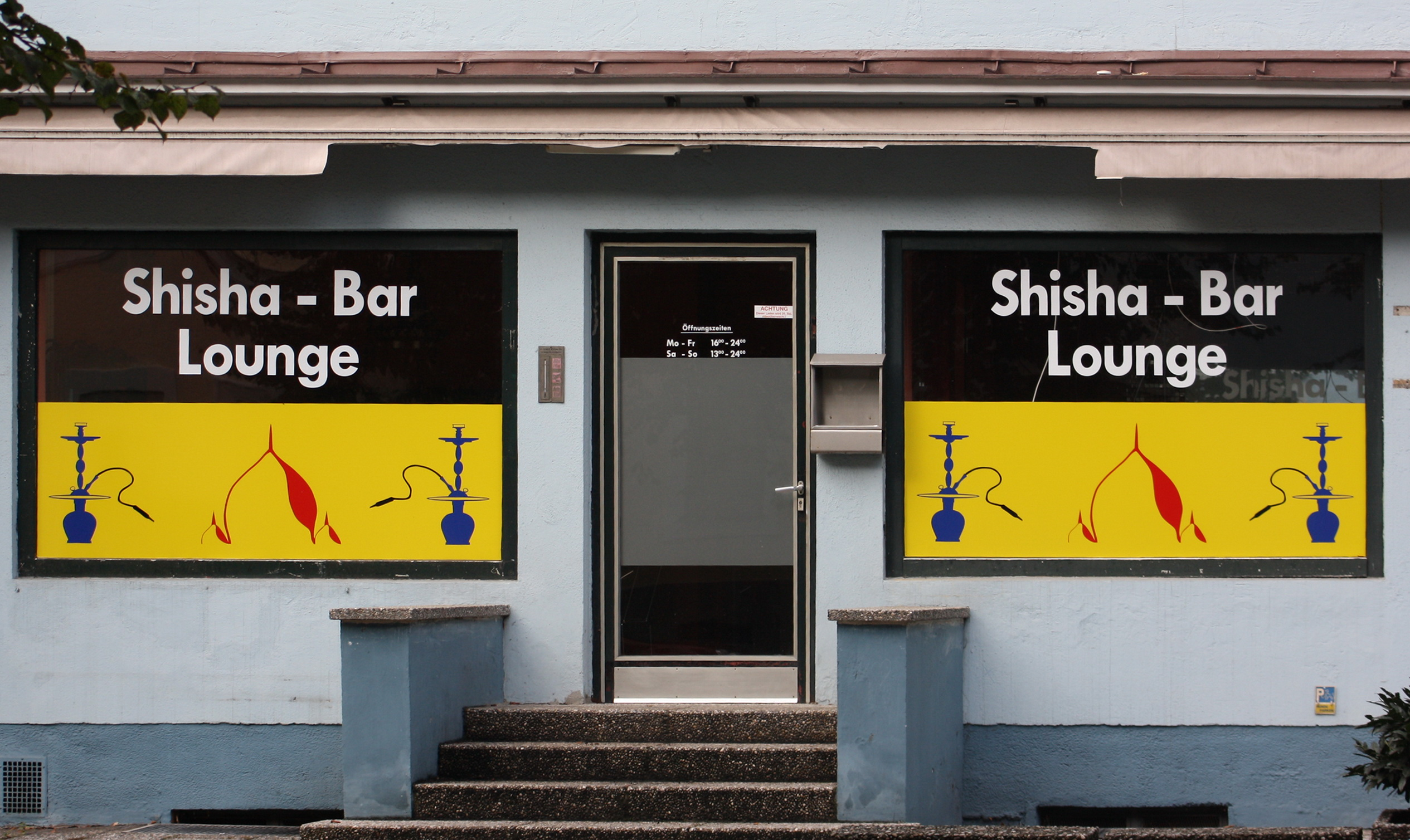 Shisha Lounge in München